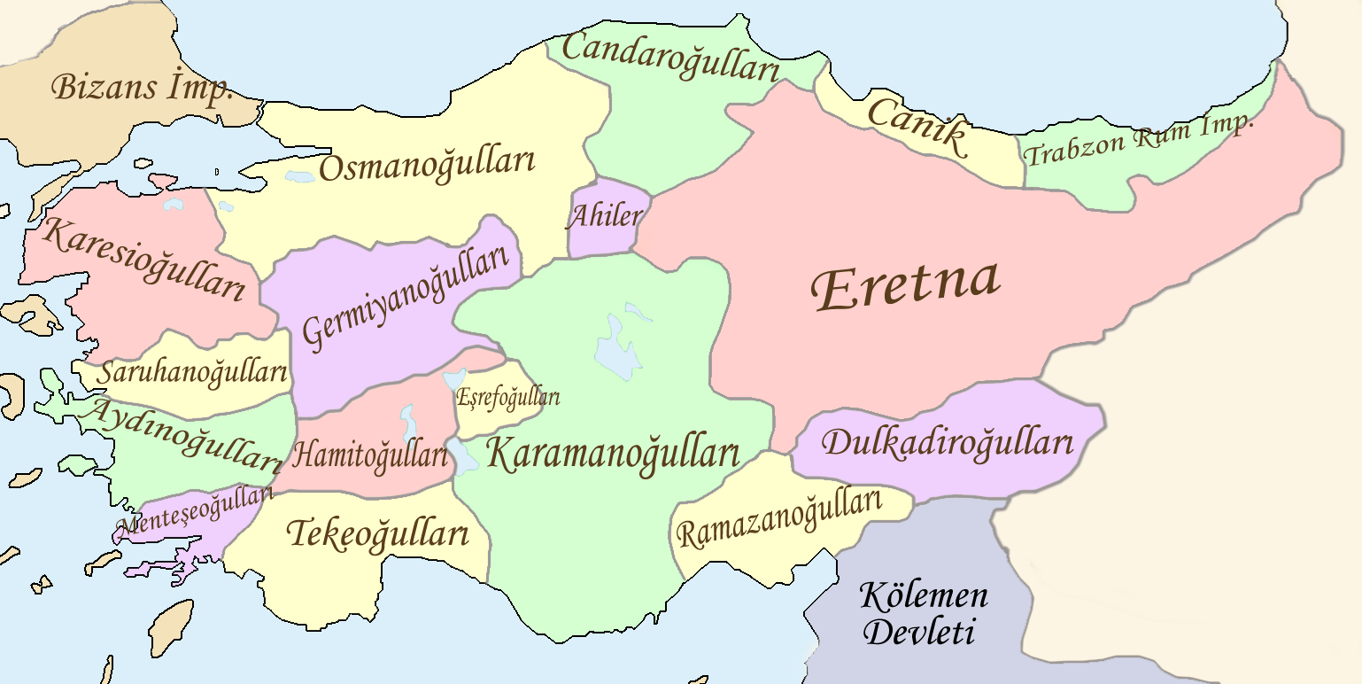 2.Dönem Anadolu Beylikleri.Aşağıda belirtilen atlaslardan üretilmiştir.